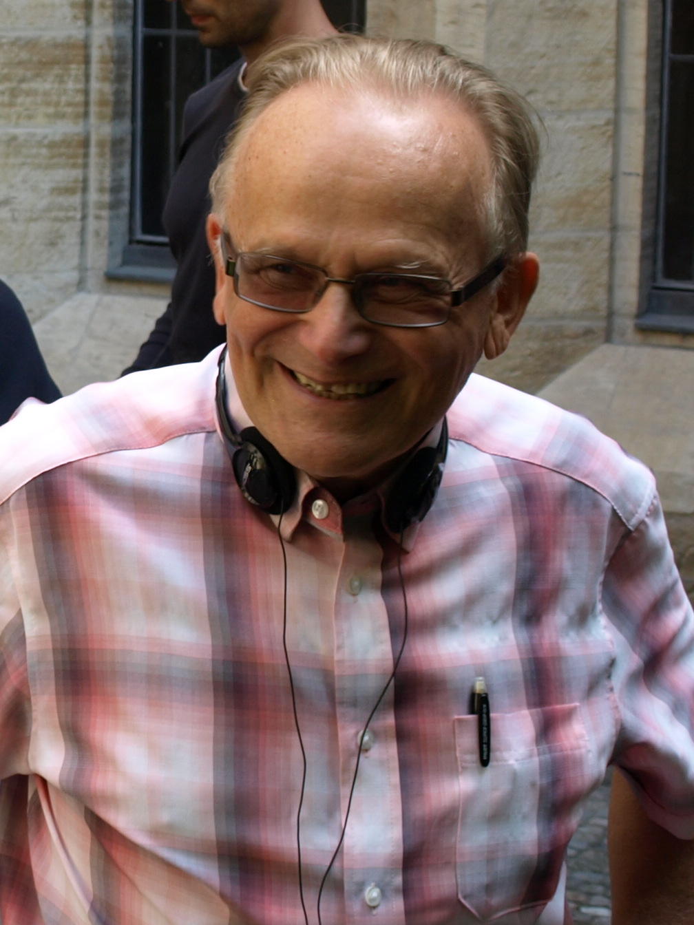 První klapka filmu Jan Hus – Autor: Karolína Černá a Emma Orphe pro & 10Mpix.cz